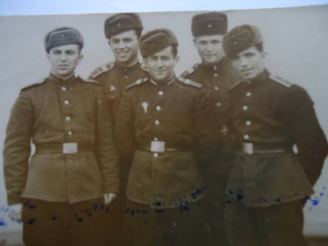 Viti 1952 Nowosibirsk/BS